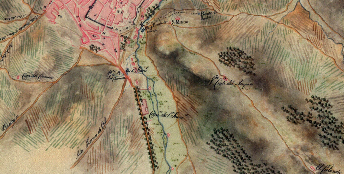 Mapa de 1822 donde se muestra al monasterio de San Francisco el Real fuera de la villa de Cáceres.